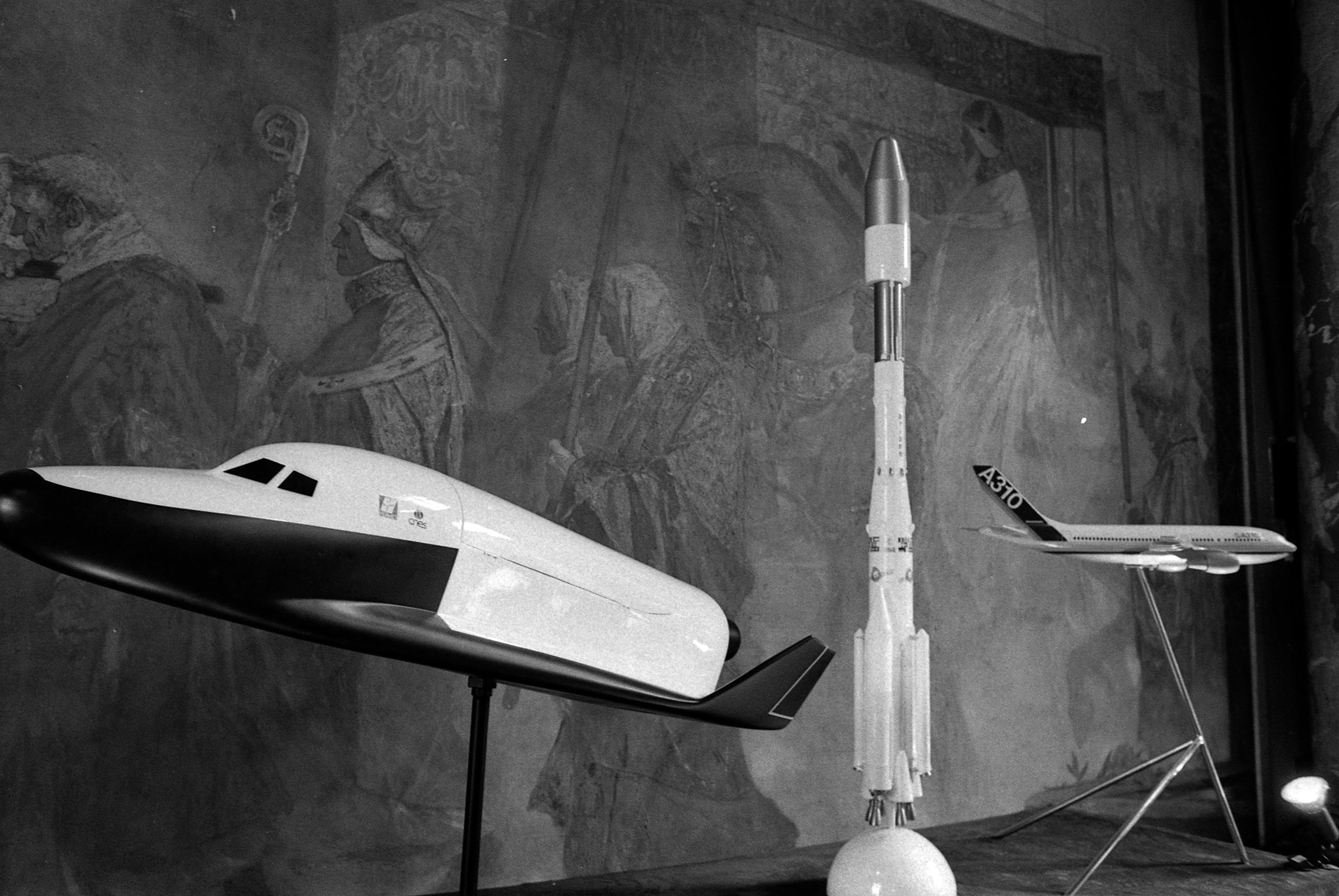 Salle des Illustres (Le Capitole). 27 mai 1987. Vue d'ensemble des maquettes de la navette spatiale Hermès, de la fusée Ariane et de l'avion Airbus A310 exposées sur une table ; en arrière-plan peinture de Benjamin Constant "L'entrée du Pape Urbain II à Toulouse". Exposition certainement réalisée dans le cadre de la manifestation "Siencefête 87".